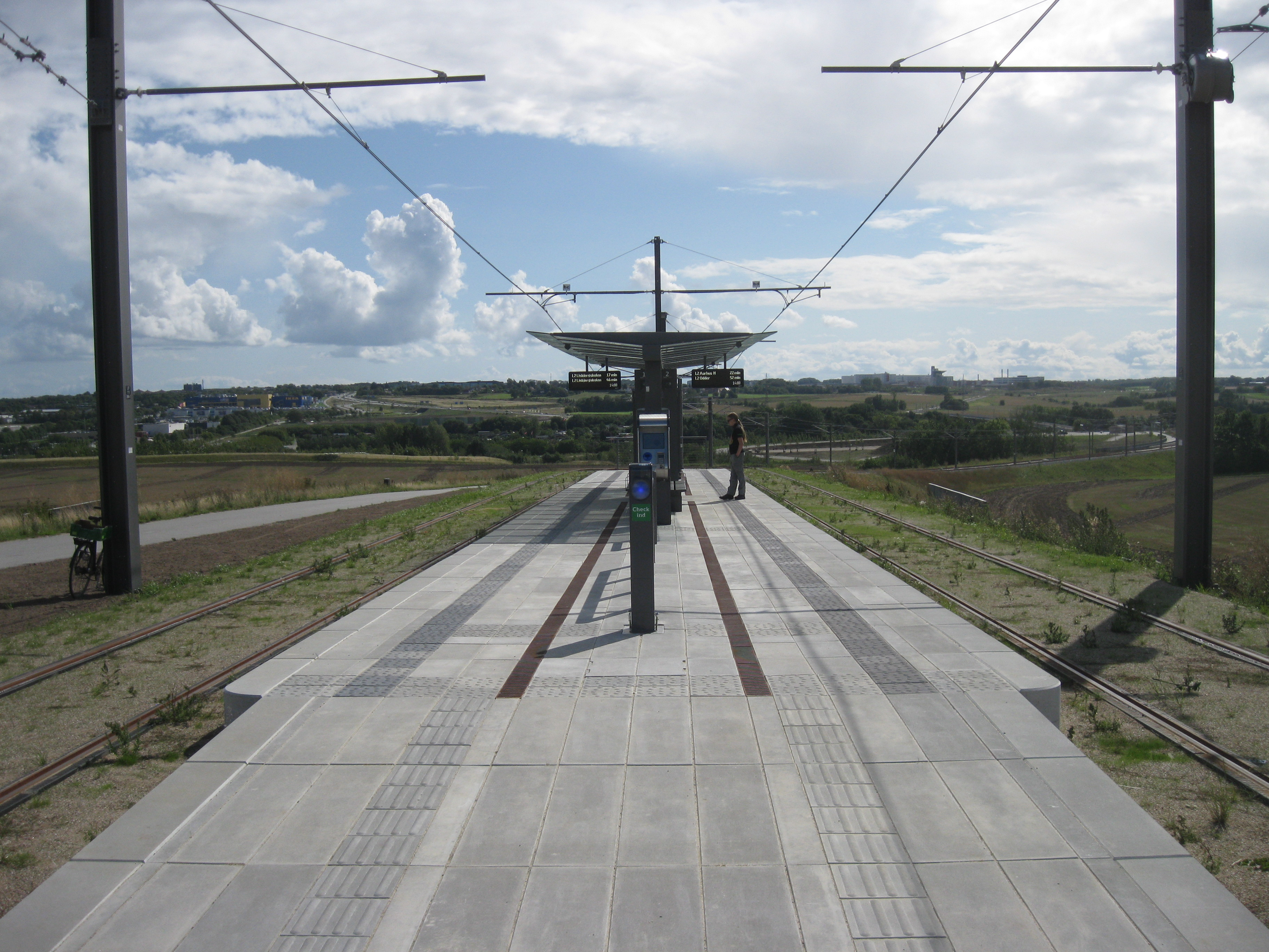 Lisbjerg Bygade Station, Århus Letbane